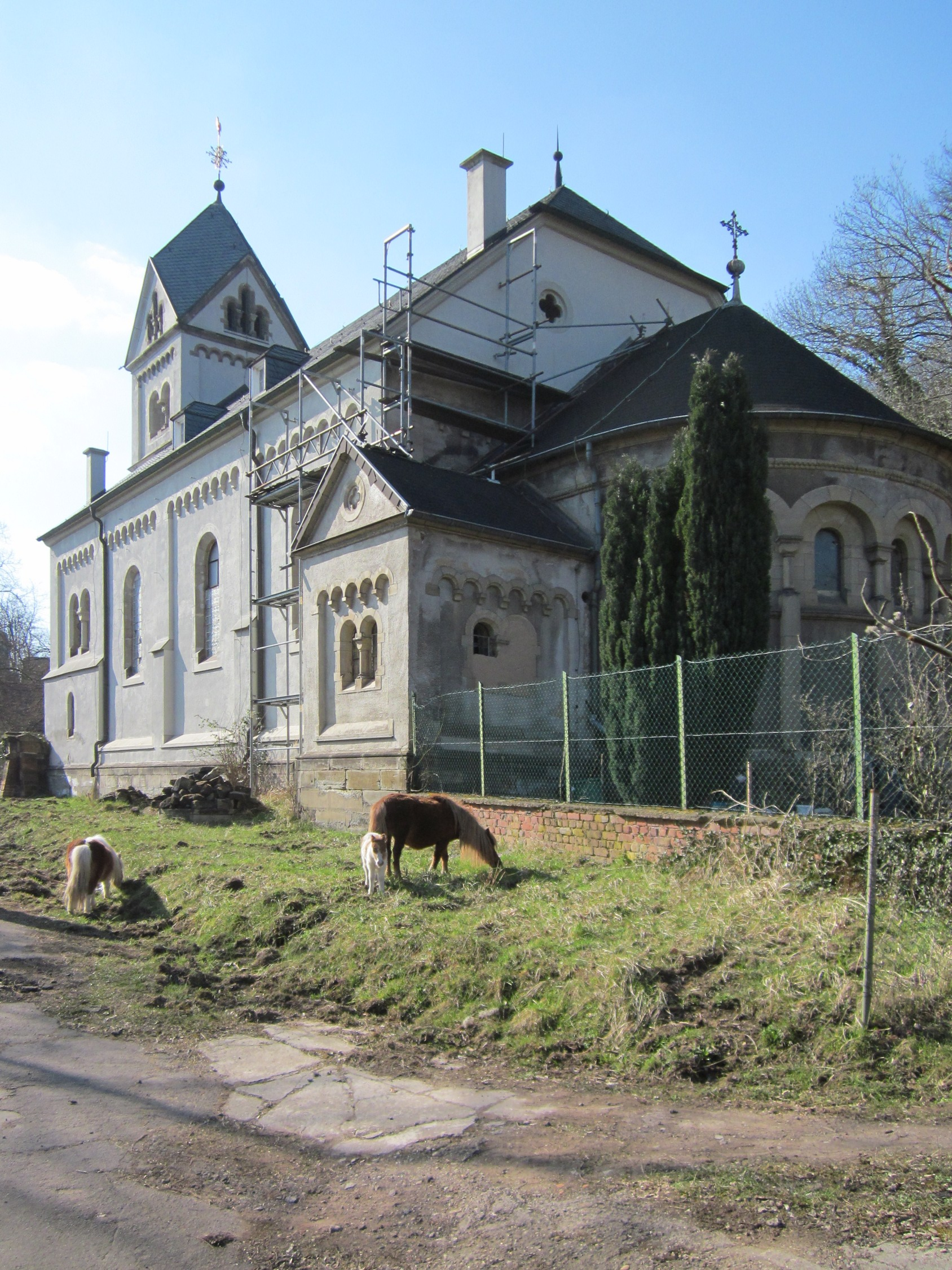 Stummsche Kapelle am Halberg (Saarbrücken)